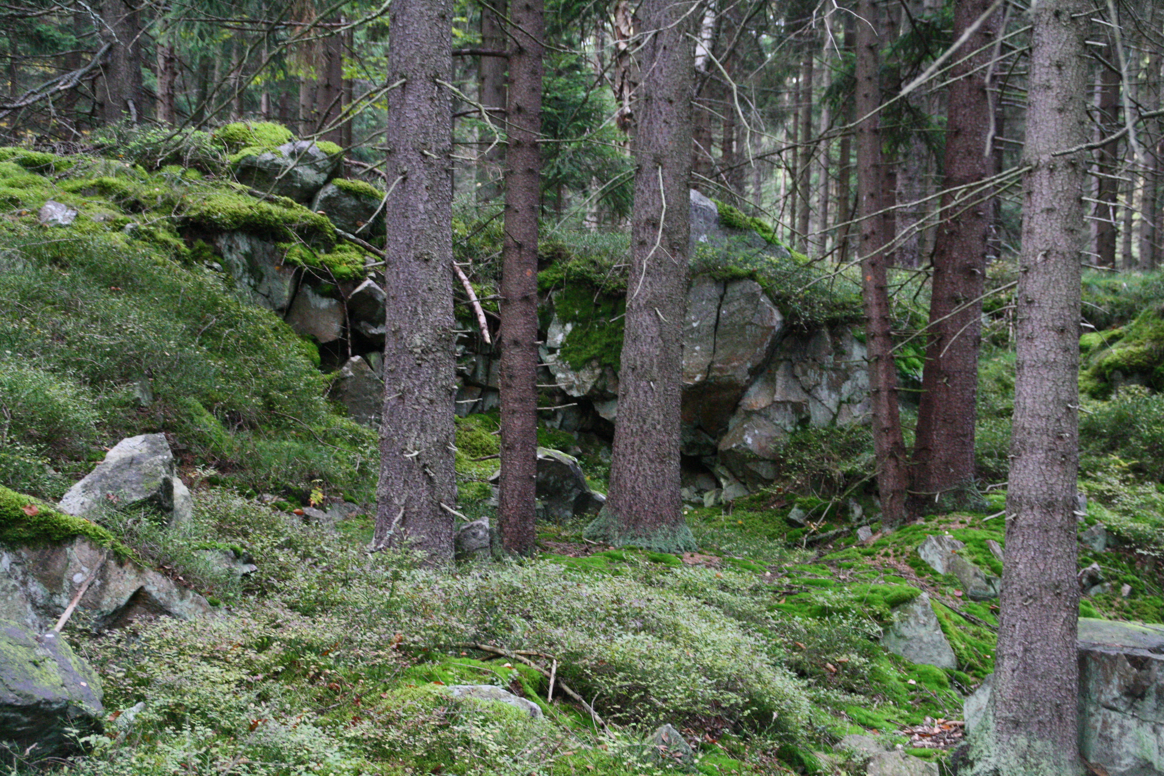 Vrchol Třemešného vrchu se skalními výchozy